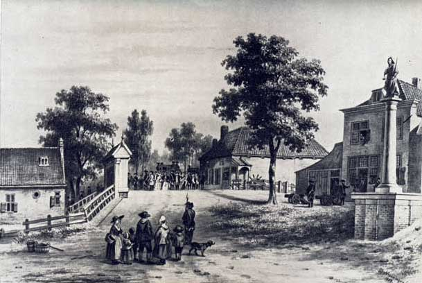 de aankomst van prinses Wilhelmina van Pruisen bij Goejanverwellesluis te Hekendorp op 28 juni 1787title QS:P1476,nl:"de aankomst van prinses Wilhelmina van Pruisen bij Goejanverwellesluis te Hekendorp op 28 juni 1787" label QS:Lnl,"de aankomst van prinses Wilhelmina van Pruisen bij Goejanverwellesluis te Hekendorp op 28 juni 1787"